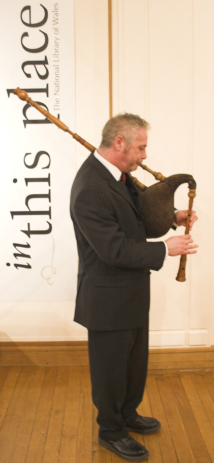 sachbib yn y llyfrgell gen